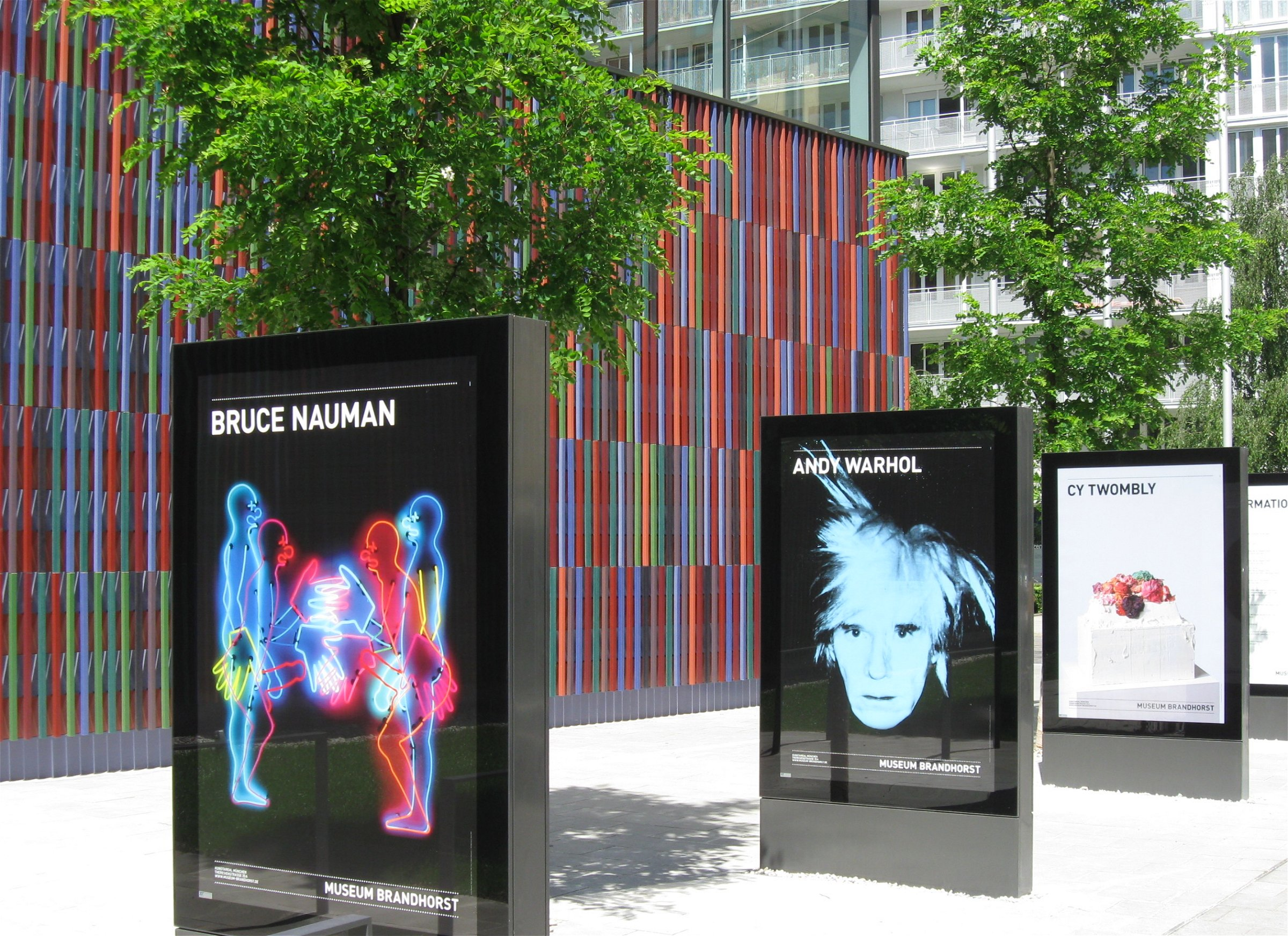 Museum Brandhorst, Informationstafeln